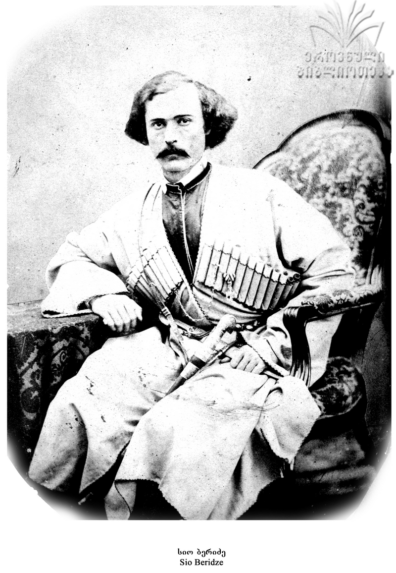 აზნაური სიო ბერიძე